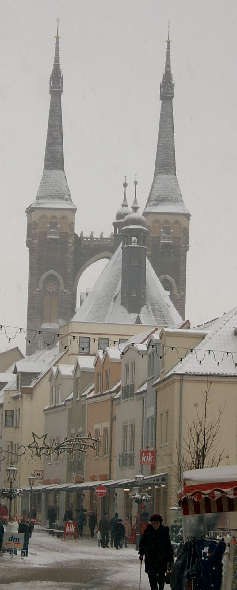 Die St. Jakobs Kirche in Köthen (Anhalt) - OpenStreetMap(Info)